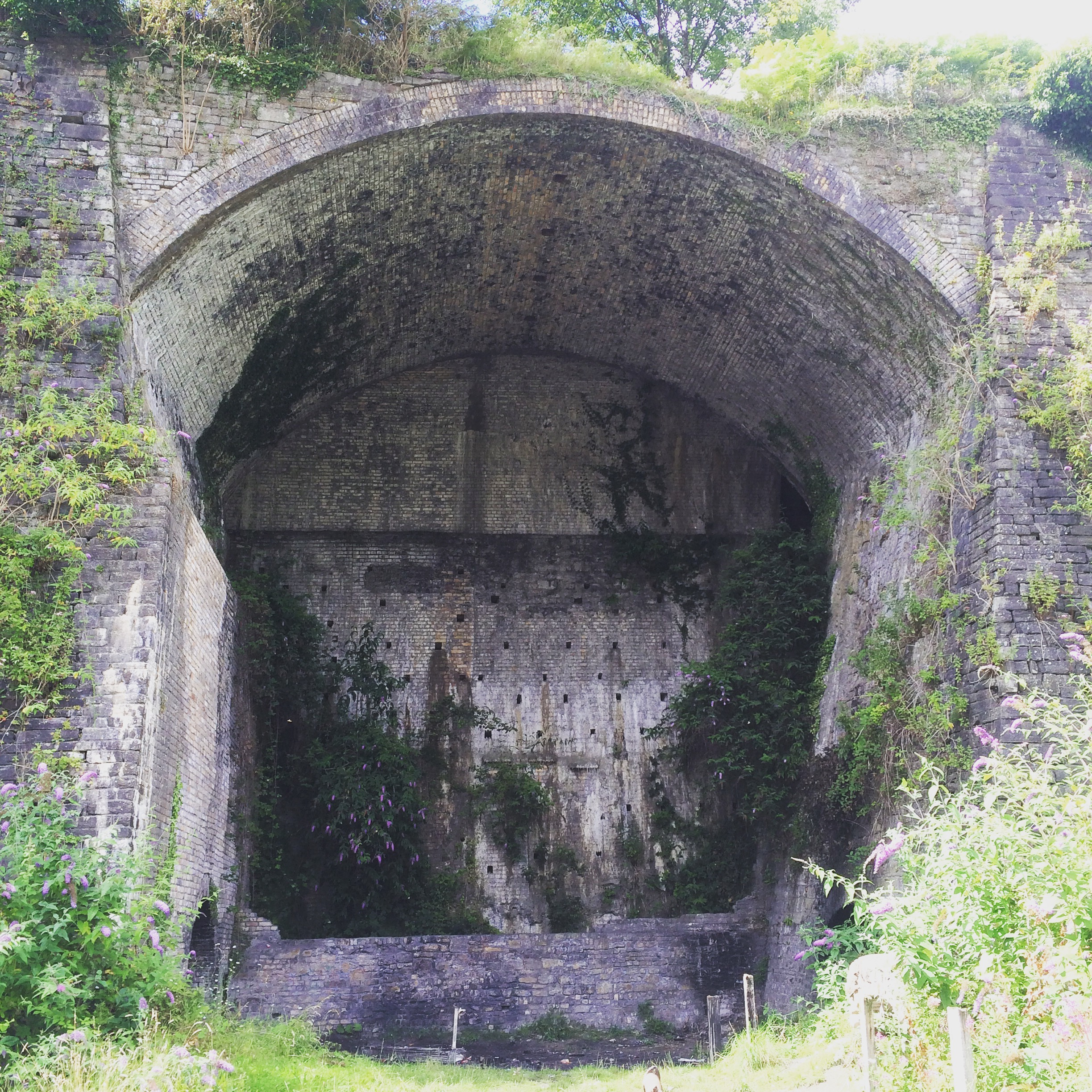 Olion ffwrneisi Gwaith Haearn Cyfarthfa.